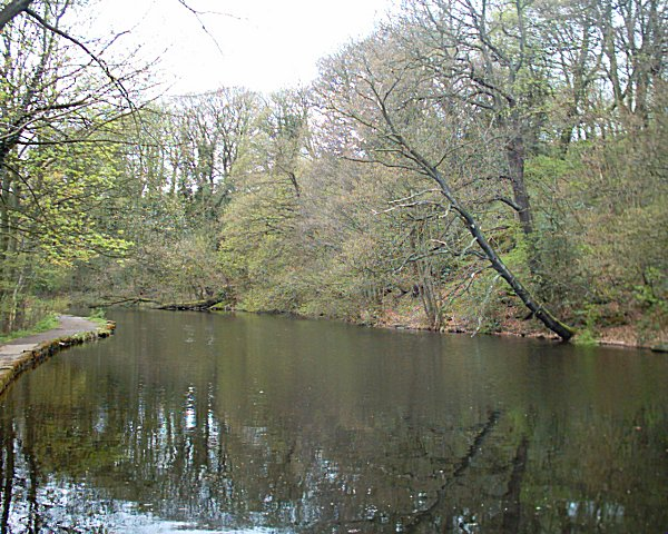 Rivelin Valley.